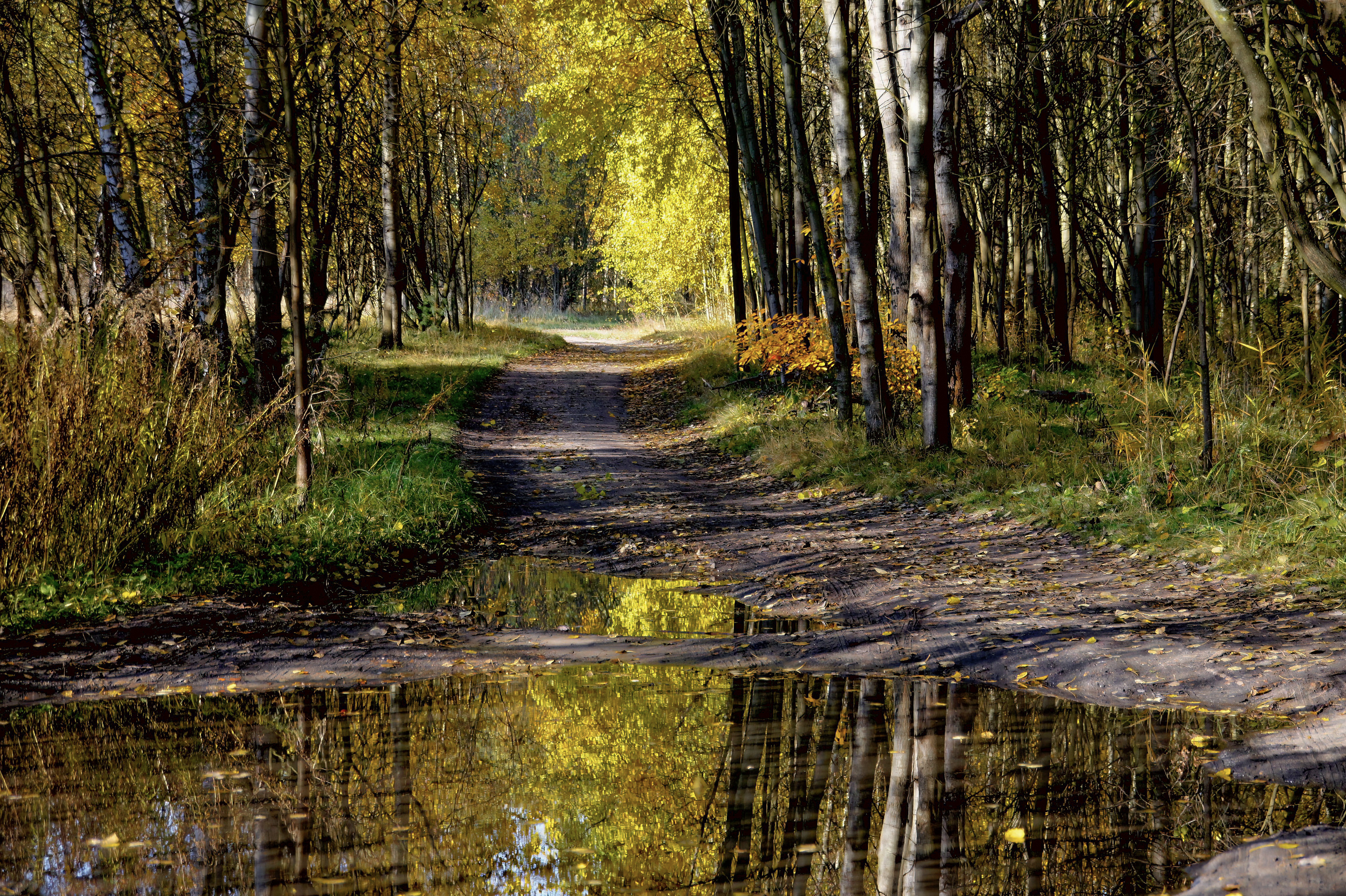 Droga wokół stawu Morawa w zespole przyrodniczo-krajobrazowym Szopienice-Borki